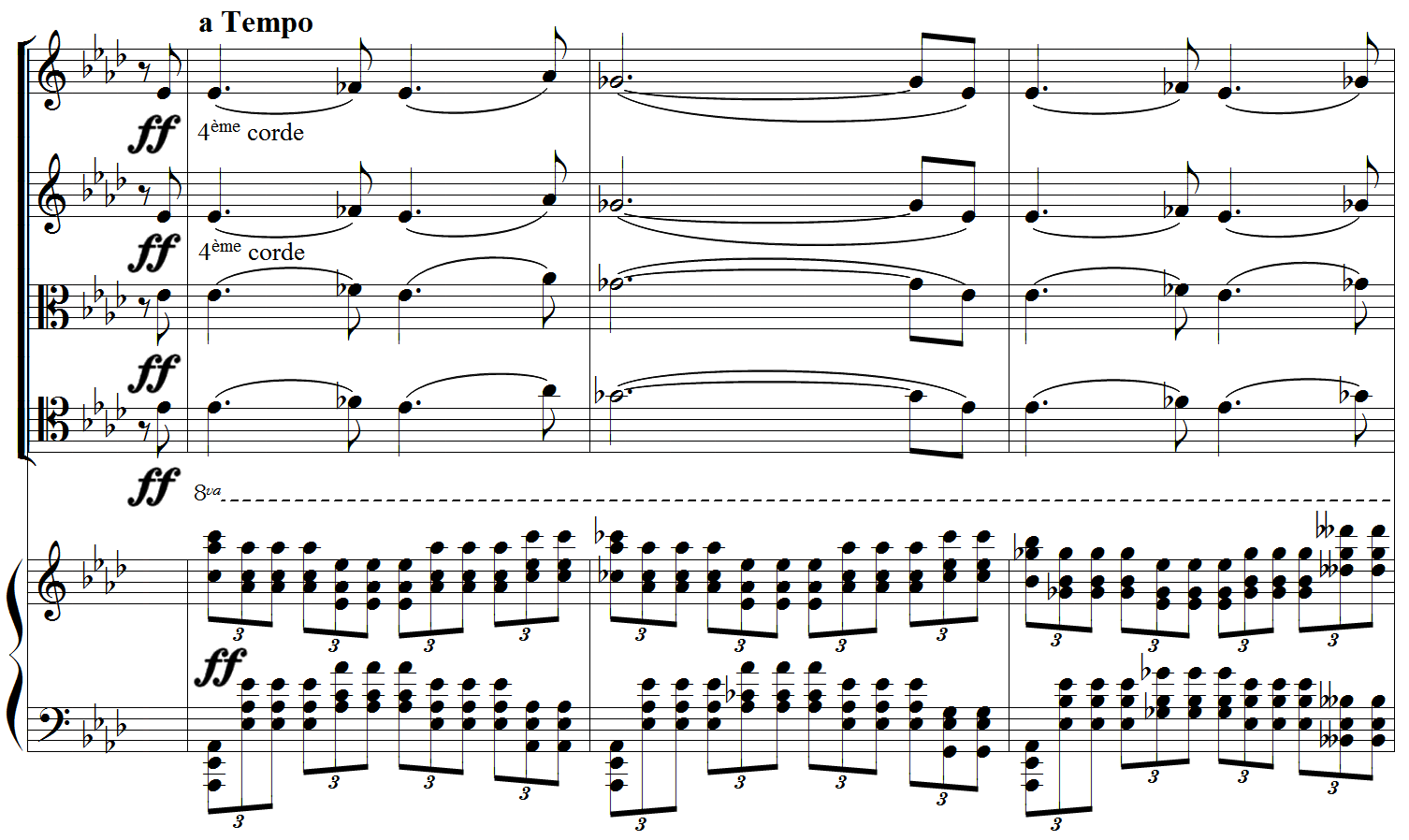 Louis Vierne : Quintette pour piano et cordes op.42, 1er mouvement, retour du thème principal à l'unisson au quatuor